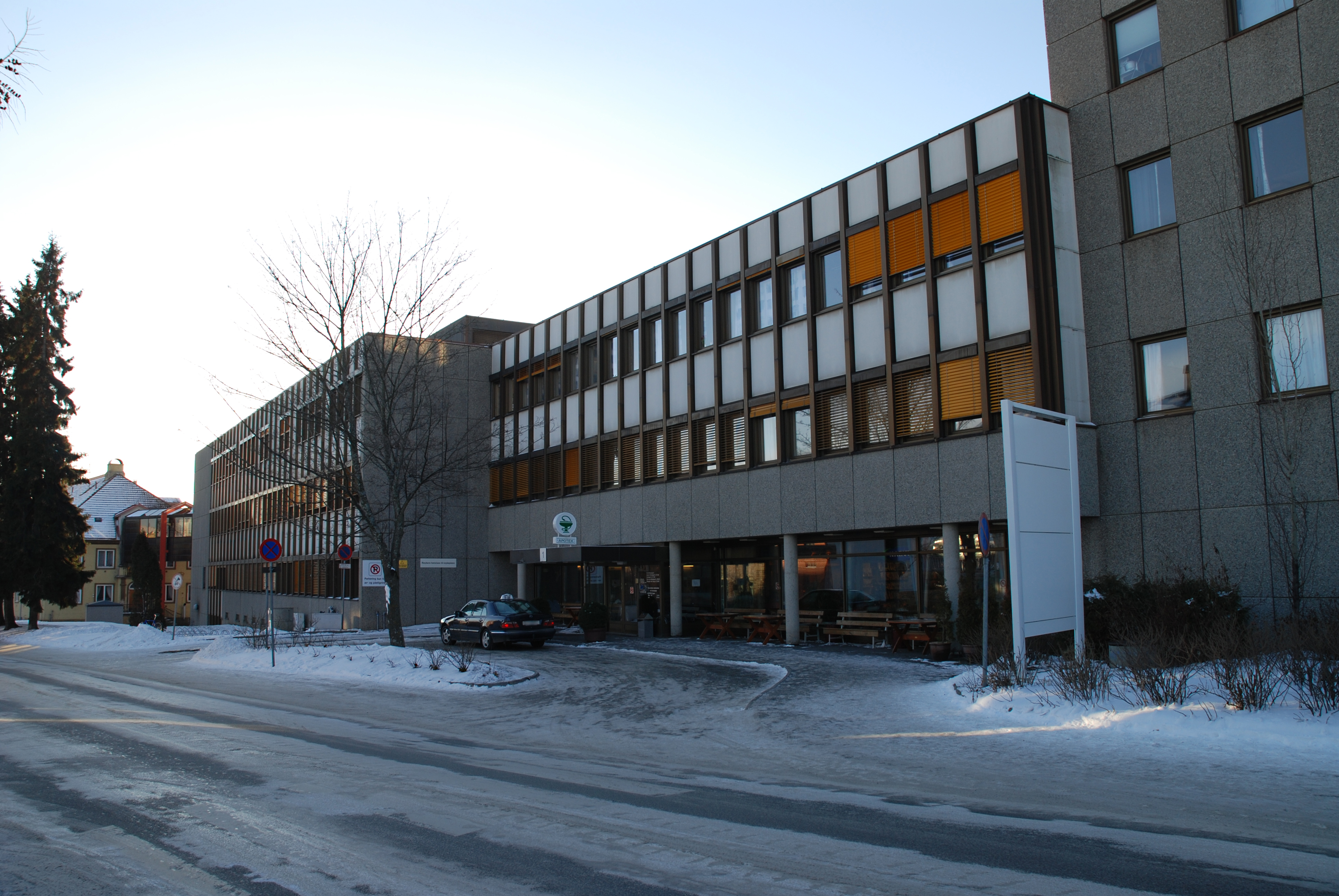 Hamar sykehus, in Hamar, Norway.